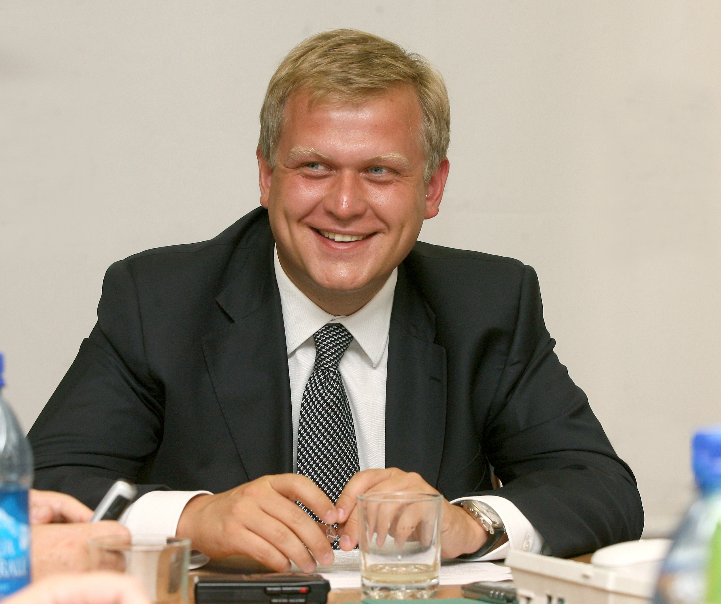 Капков Сергей Александрович